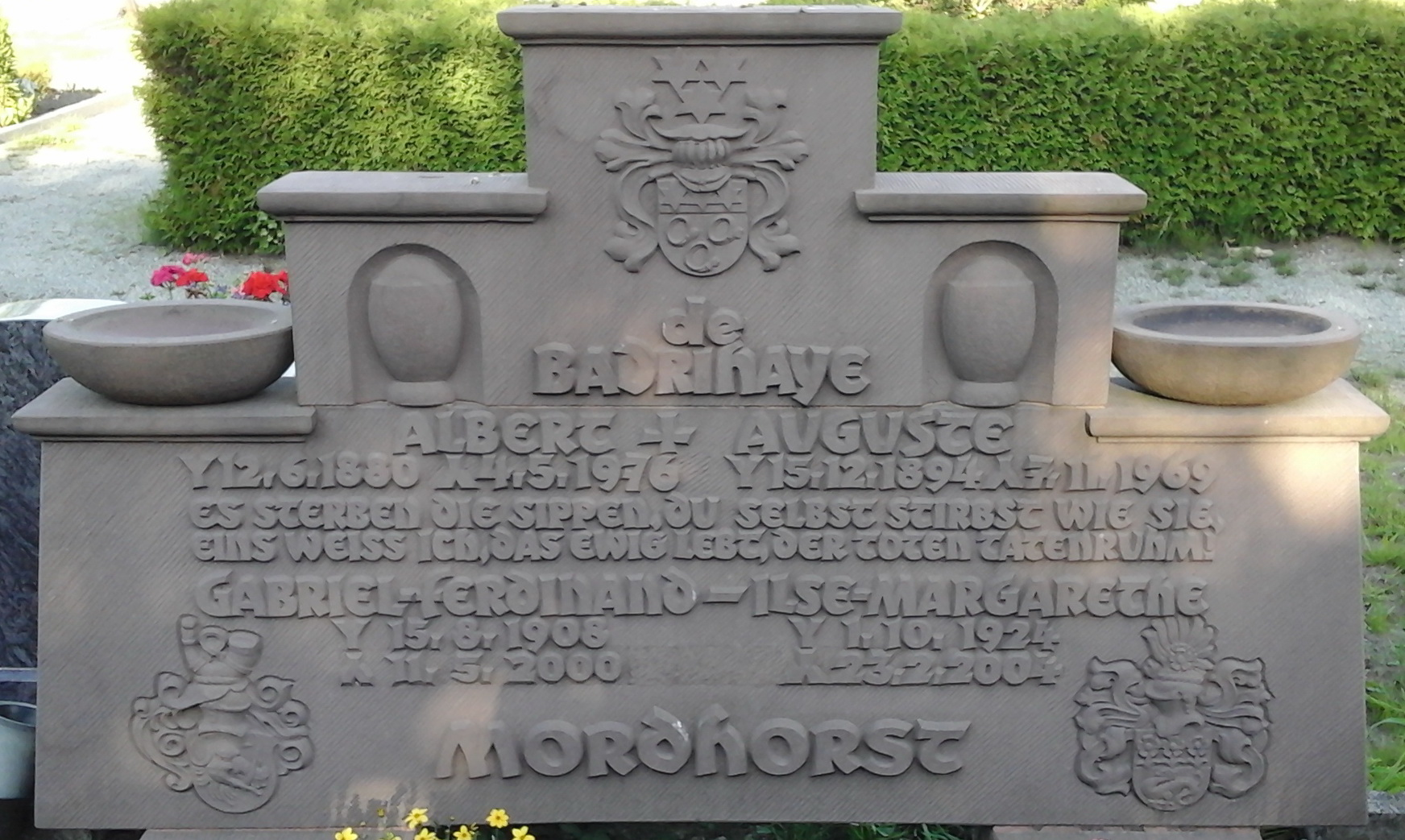 Grabstein der Familie Badrihaye und Mordhorst